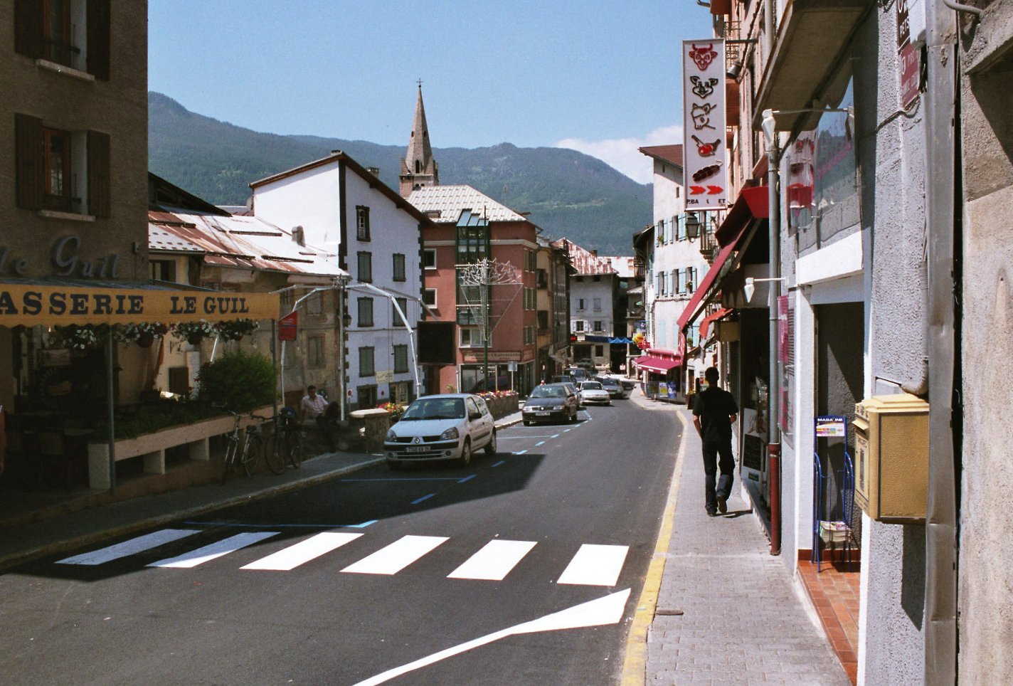 Straatbeeld in Guillestre.